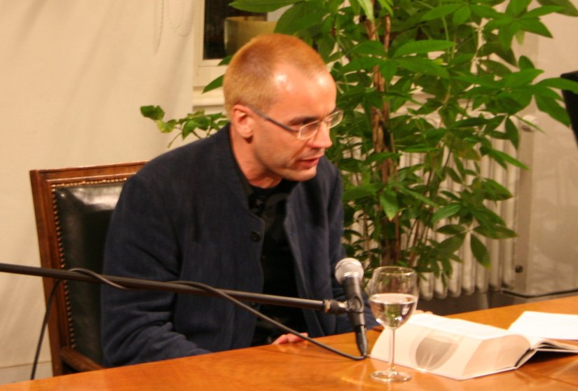 Übersetzer Ulrich Blumenbach liest aus dem Roman Unendlicher Spaß im Heidelberger Deutsch-Amerikanischen Institut